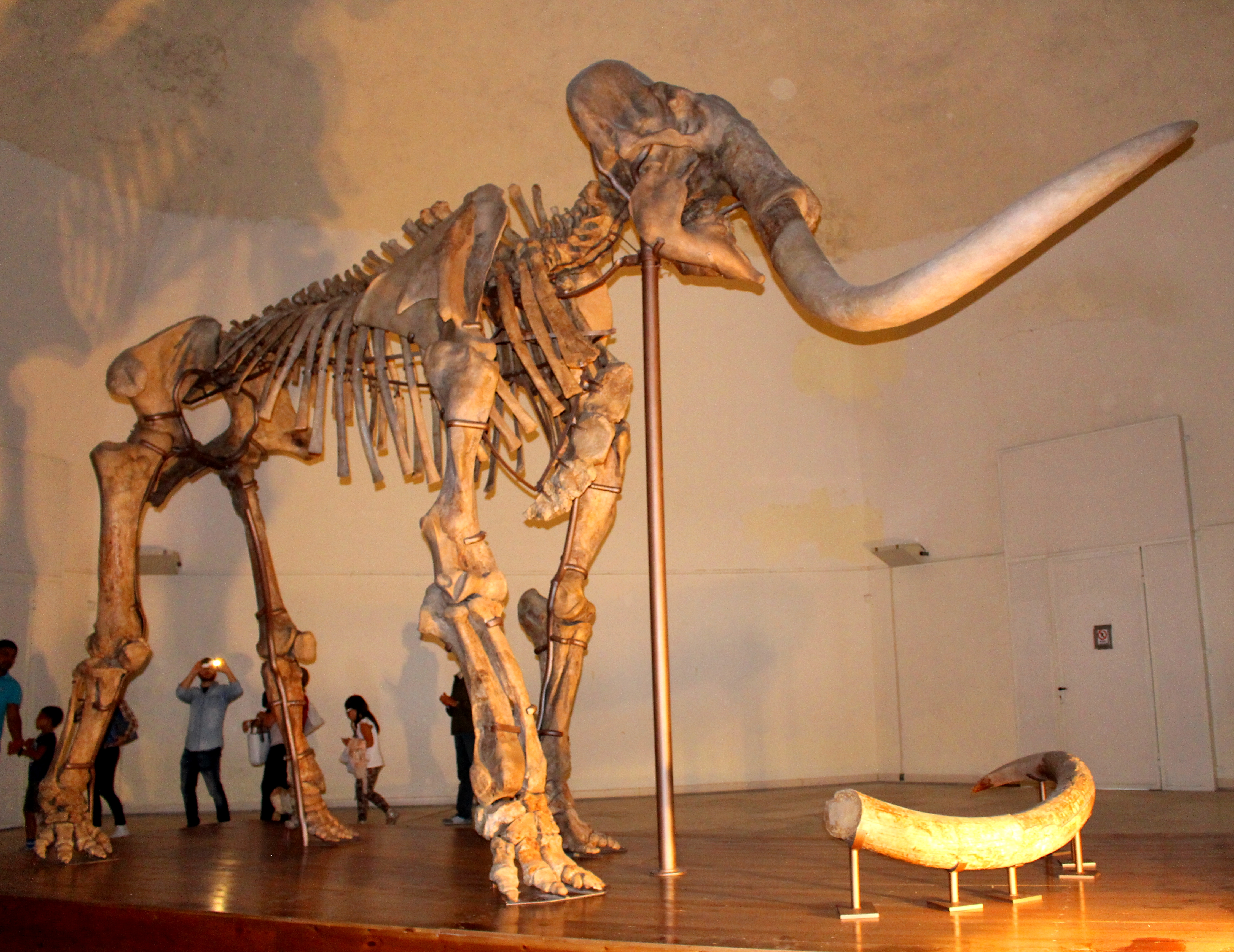 Scheletro completo del Mammuthus meriodionalis (Museo nazionale d'Abruzzo, L'Aquila)